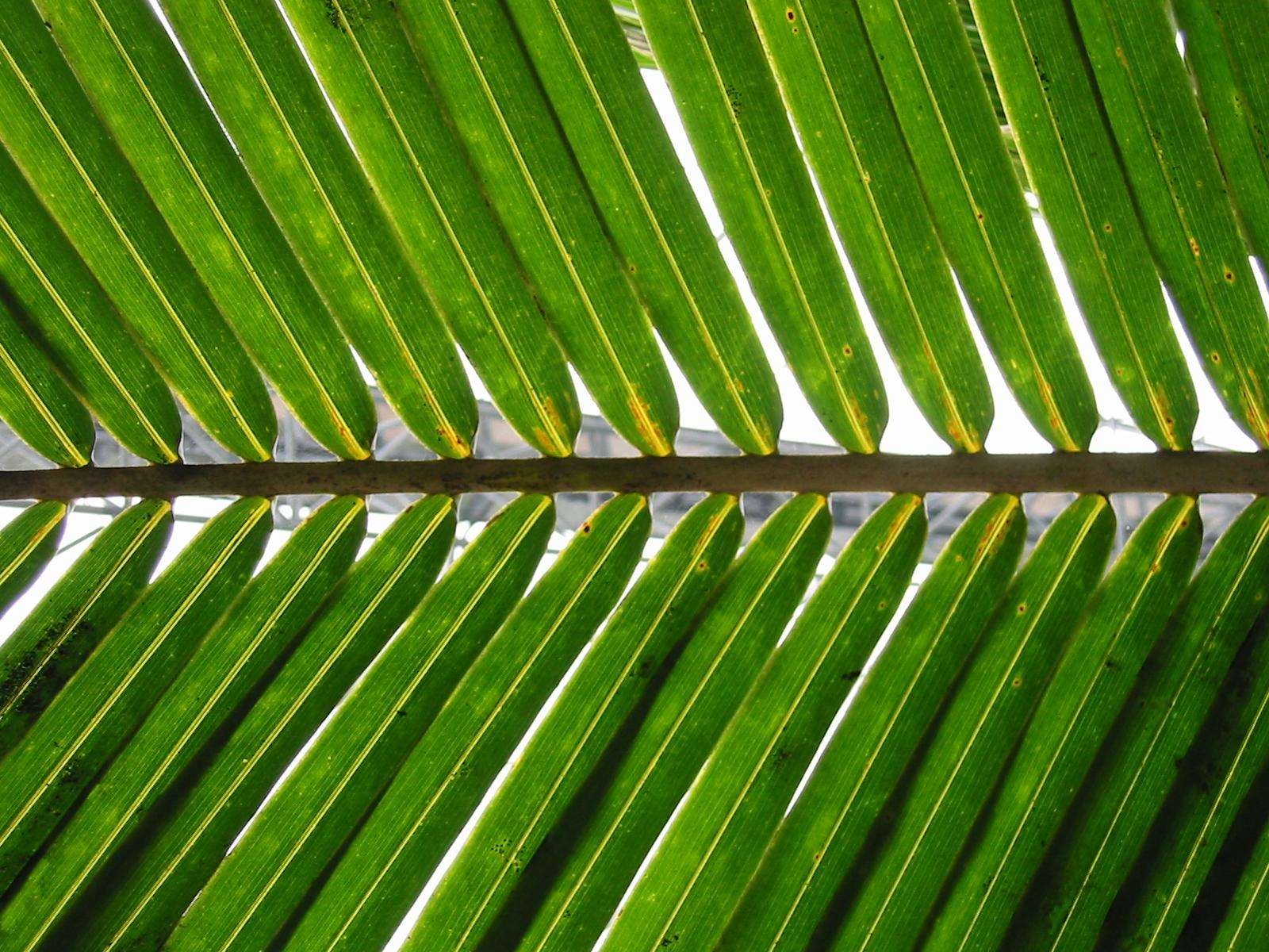 Palm fronds